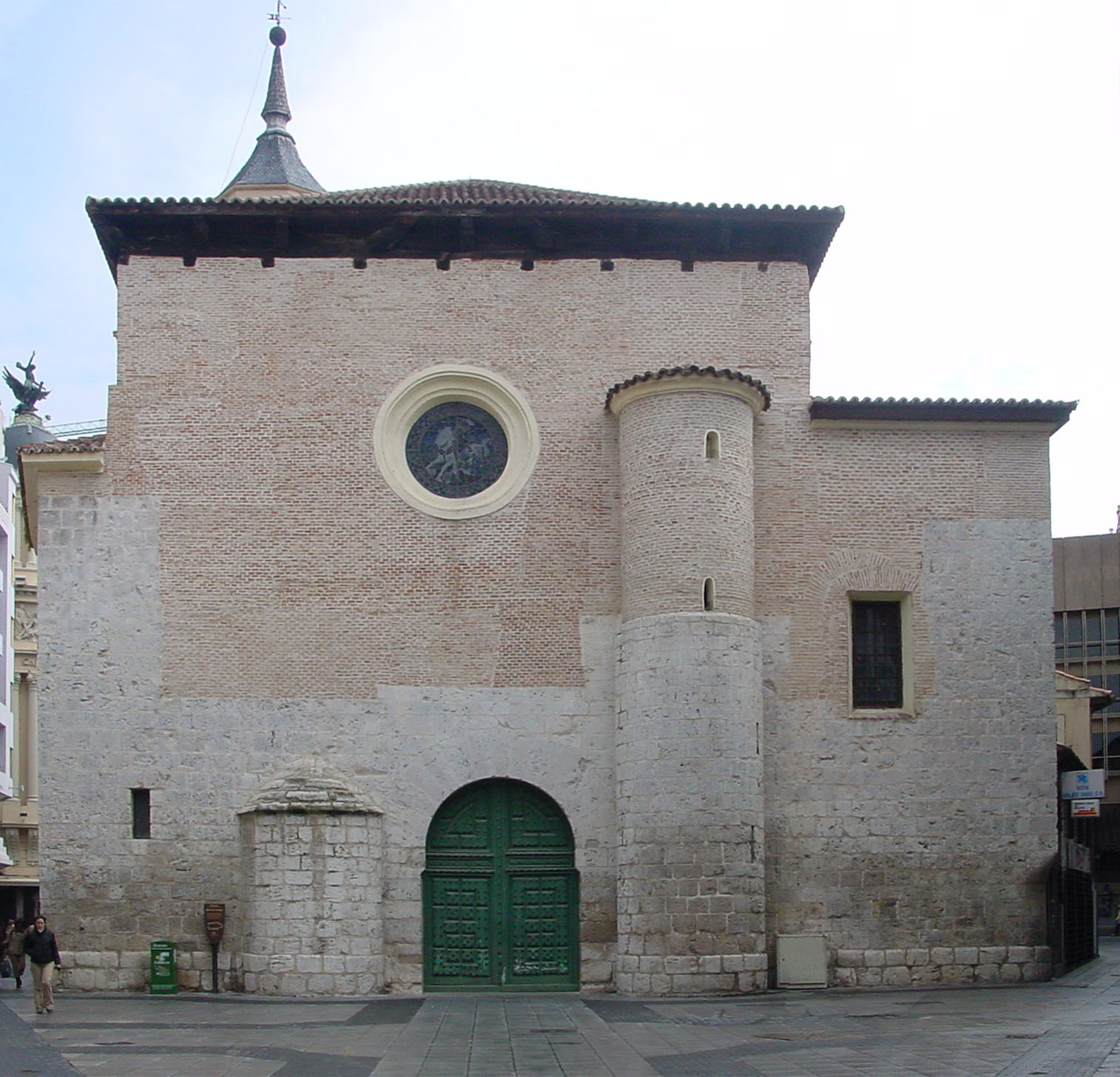 Valladolid, iglesia de Santiago; fachada de los pies. Valladolid, Santiago church; facade of the feet.